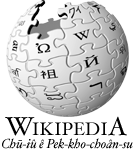 zh-min-nan Wikipedia Logo